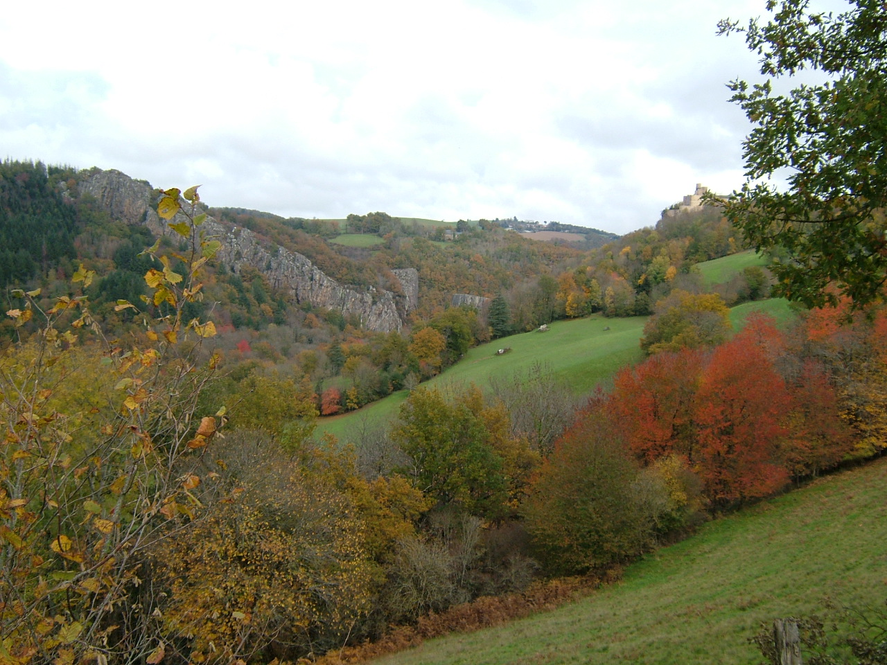 Paulinet (Tarn, Midi-Pyrénées, France). Campagne en automne: gorge de l'Oulas et château de Paulin au fond à droite.